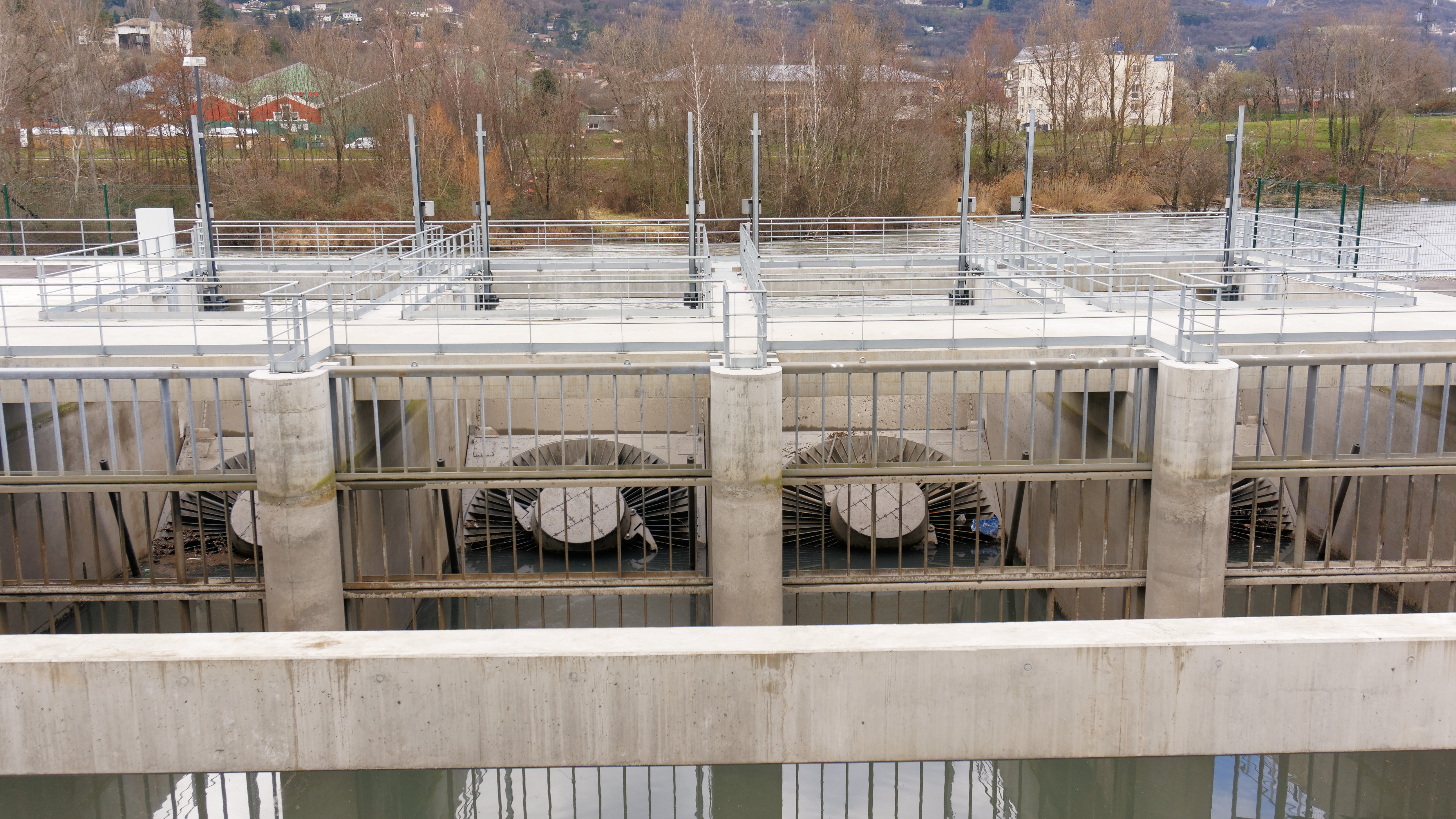 Turbines VLH de la centrale hydro-électrique du Rondeau à Échirolles